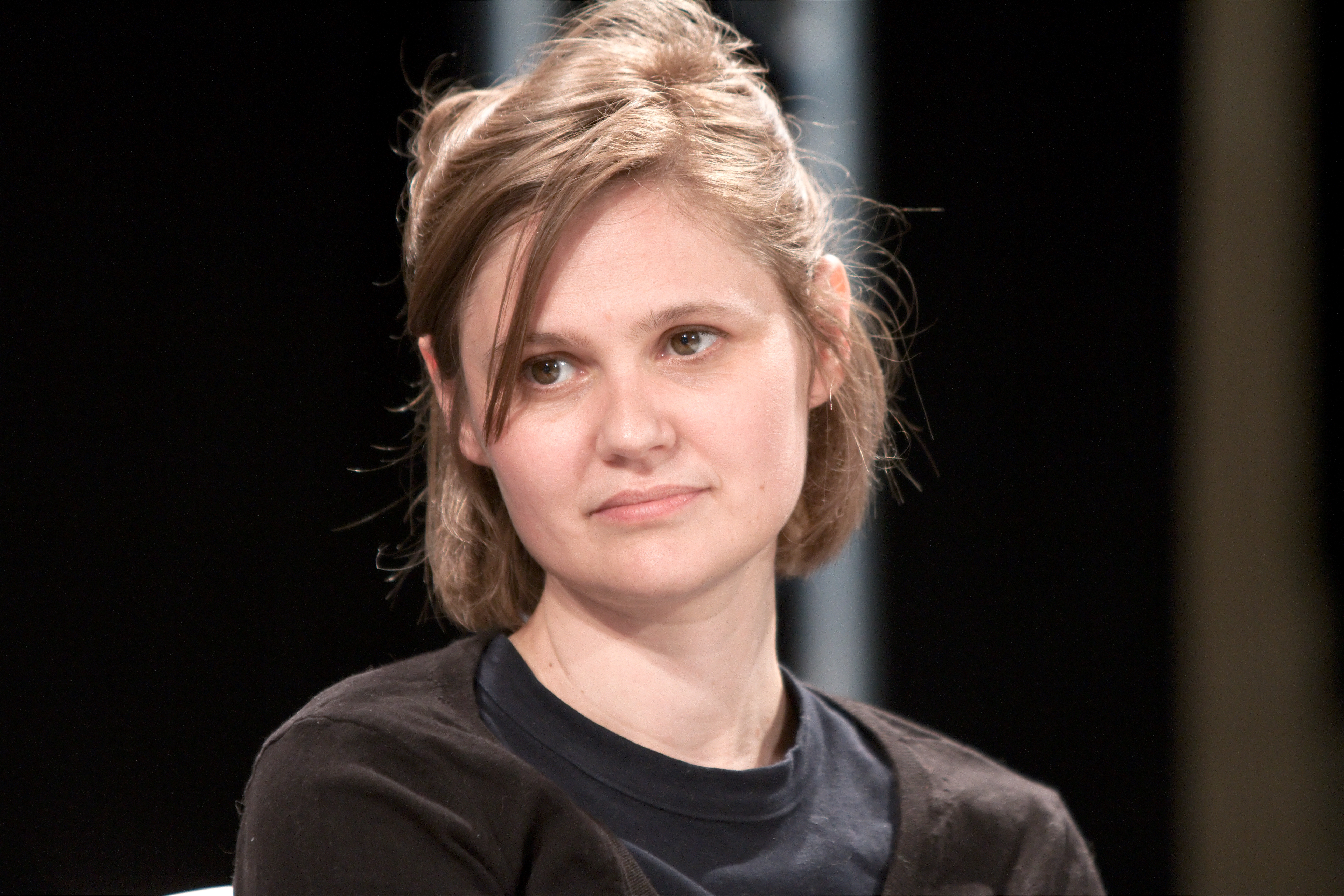 Lucie Durbiano lors du Festival de la bande dessinée d'Aix-en-Provence.